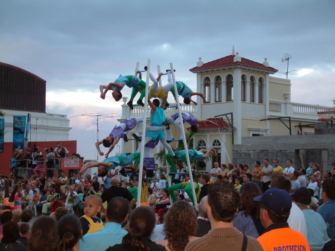 Danza de los Acróbatas. 12 de junio de 2005. Celebrada en Santa Cruz de la Palma con motivo de la Bajada de la Virgen de las Nieves 2005. Función en la Plaza de Santo Domingo.